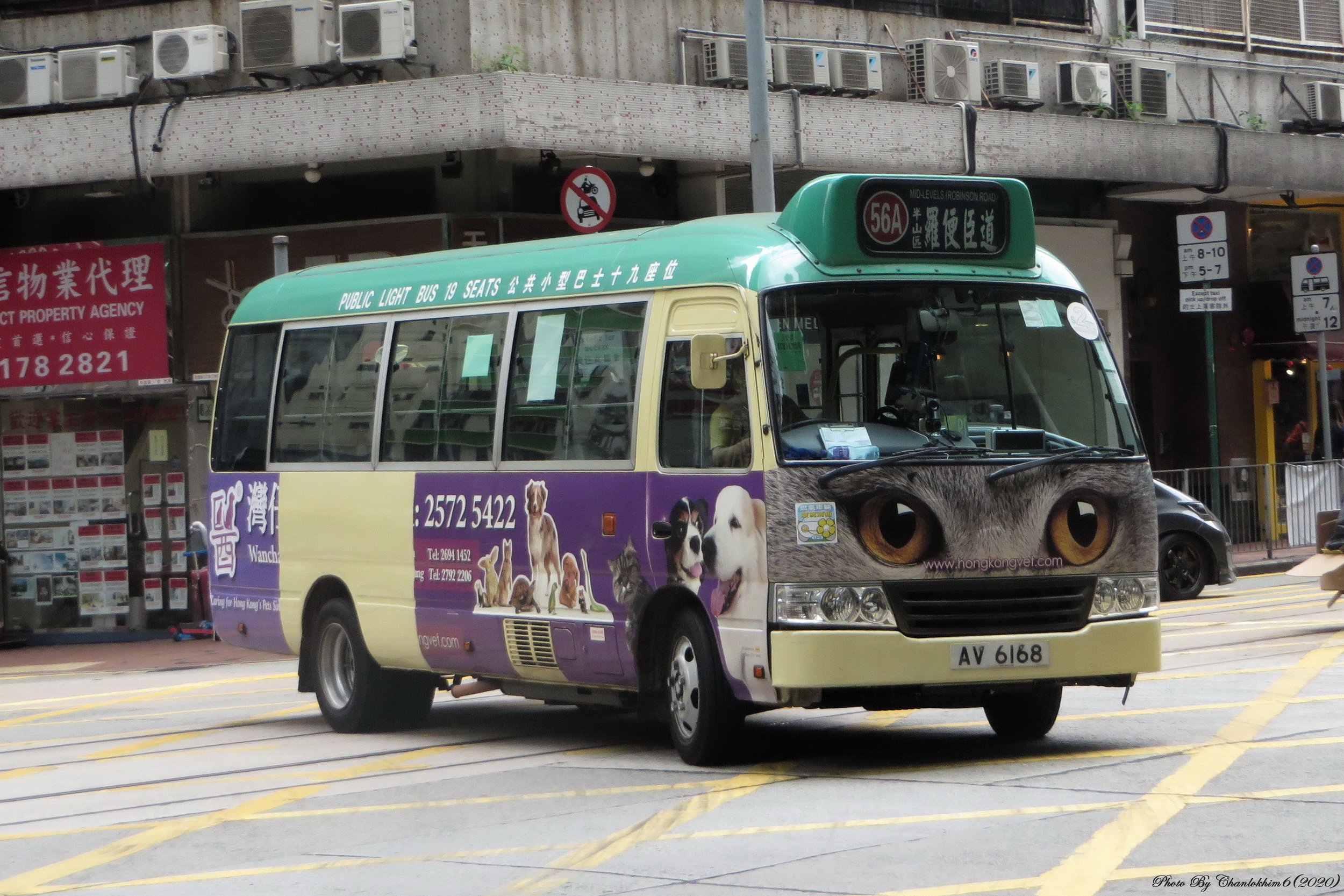 中文（中国大陆）: 小巴AV6168的照片